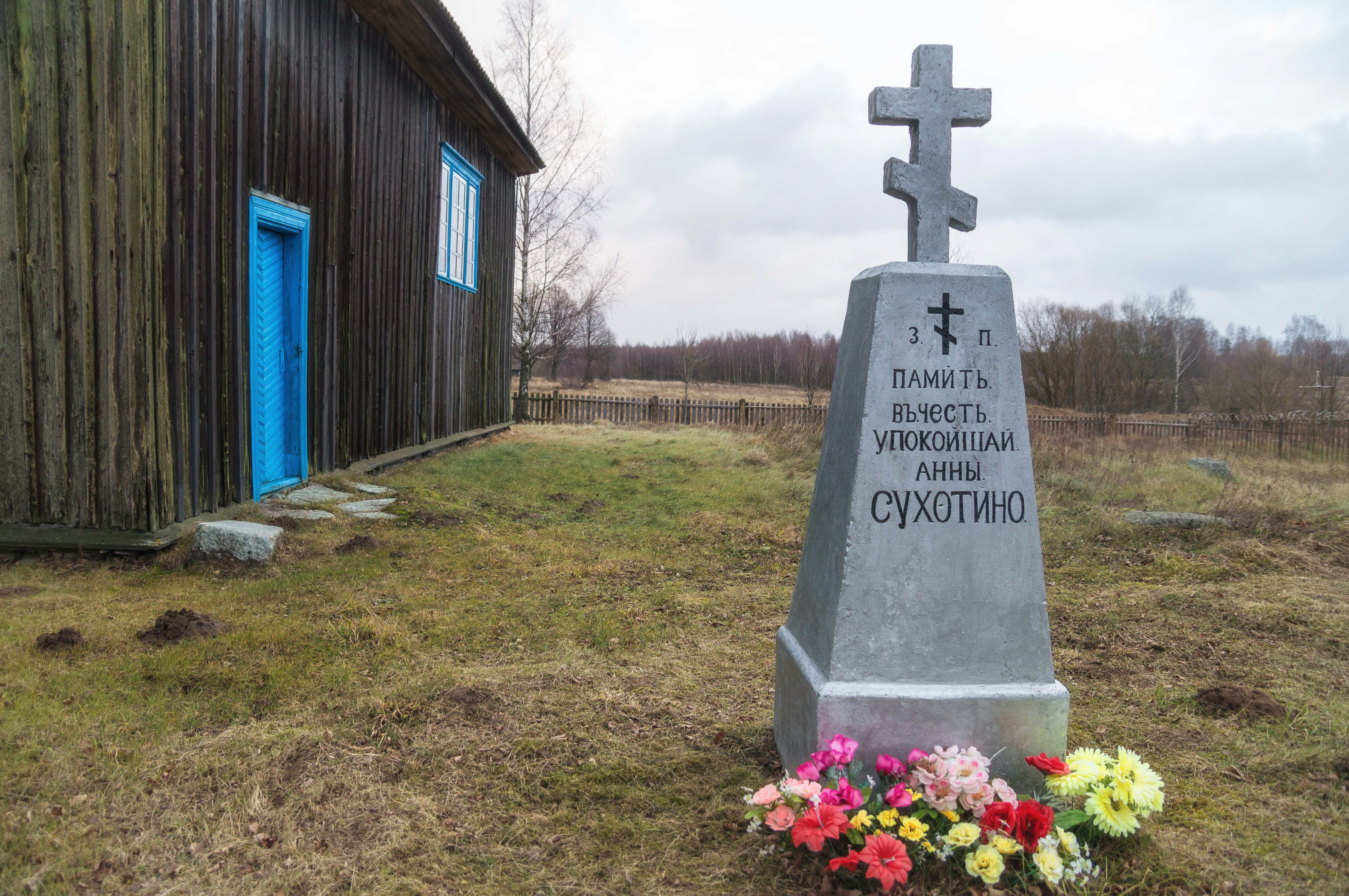 Свята-Георгіеўская царква (Вардамічы)